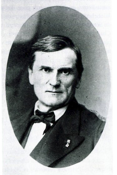 Portrait du botaniste Charles Grenier (1808-1875)